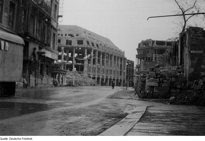 Original image description from the Deutsche FotothekZerstörter Straßenzug Blick entlang der „Seestraße“ (rechts „An der Mauer“) nach Süden in die „Prager Straße“ (Ruine des „Residenz-Kaufhaus“)